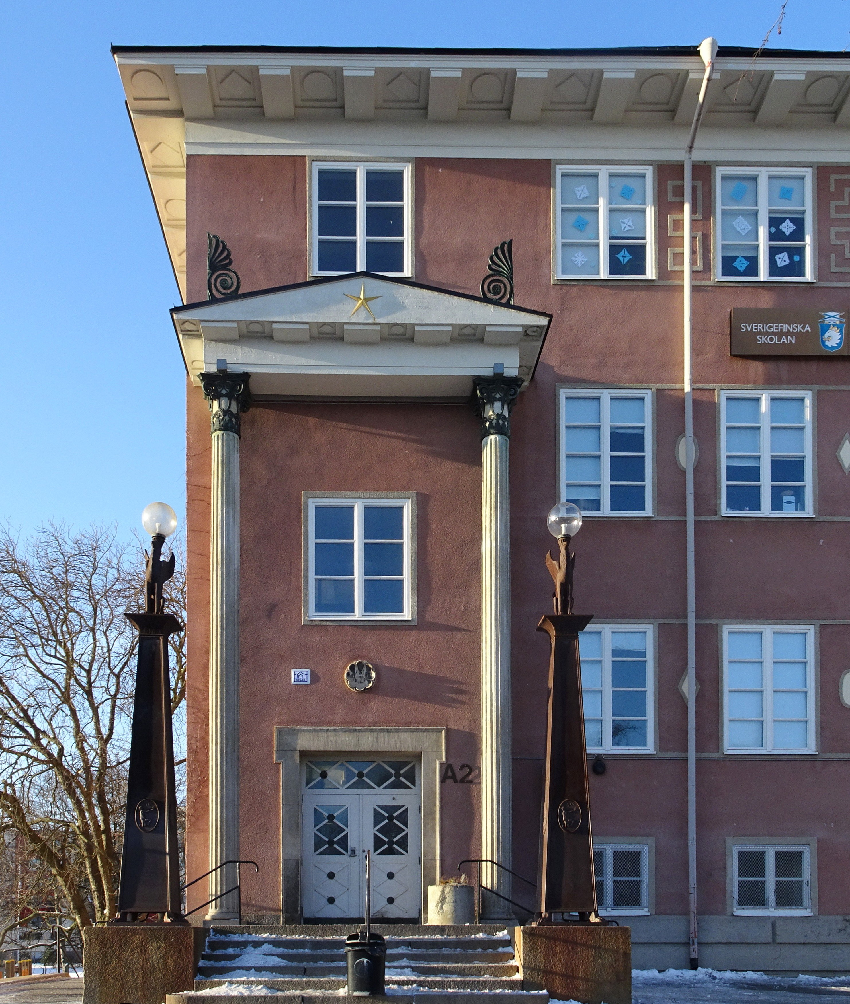 Sverigefinska skolan i Stockholm (före detta Fridhemsplans gymnasium, ursprungligen Norra kommunala mellanskolan), arkitekt Georg A. Nilsson